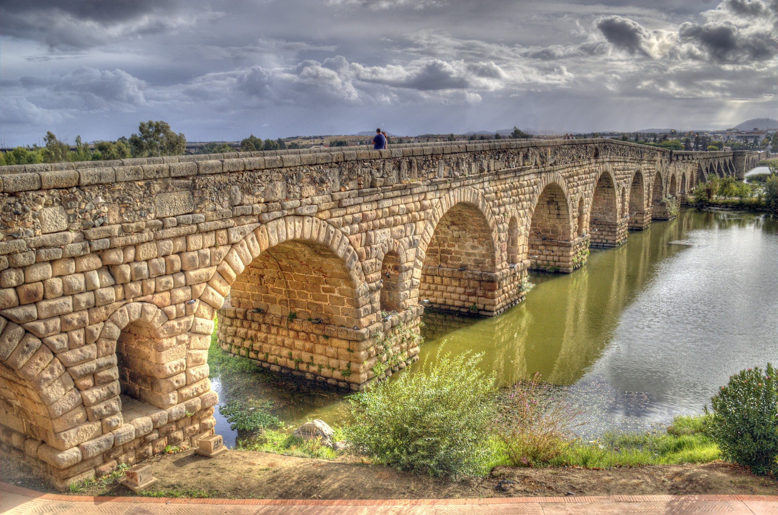 Cruza el río Guadiana mediante 62 arcos (hoy perduran 60) y más de 700 m de longitud.